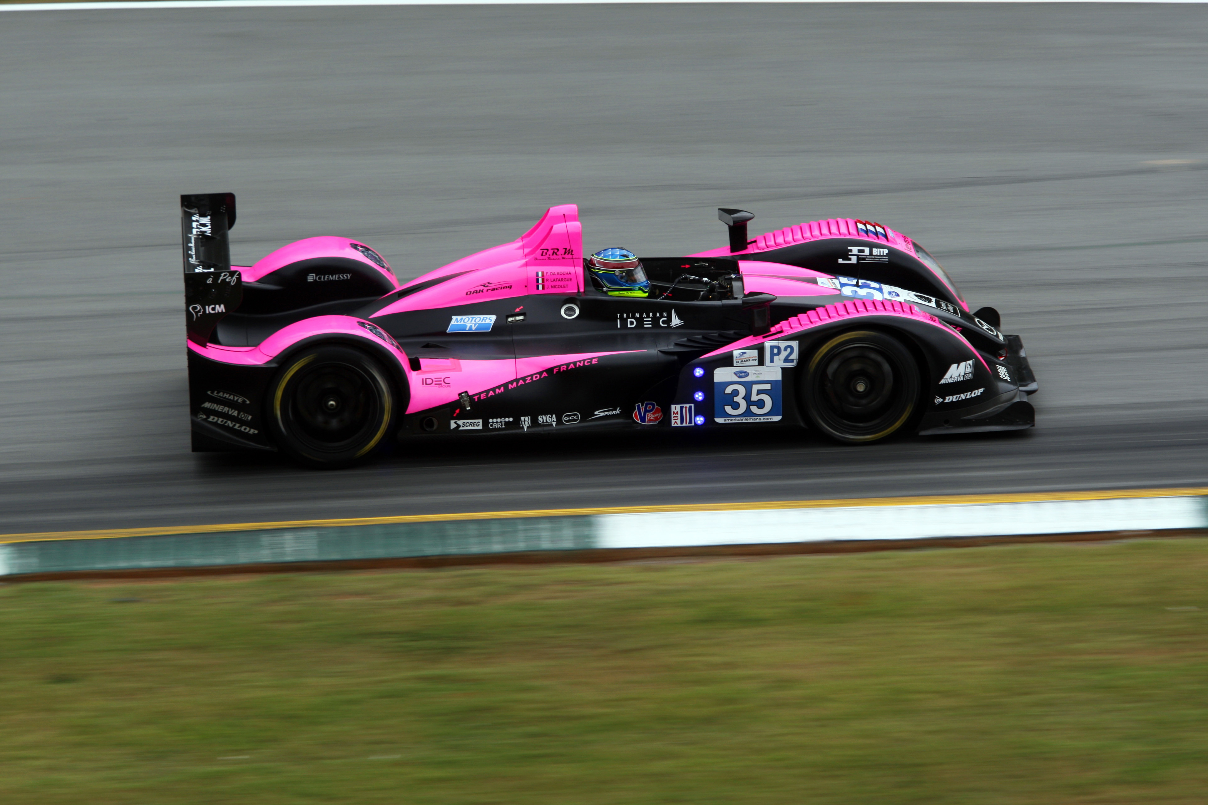 Course circuit du Petit Le Mans